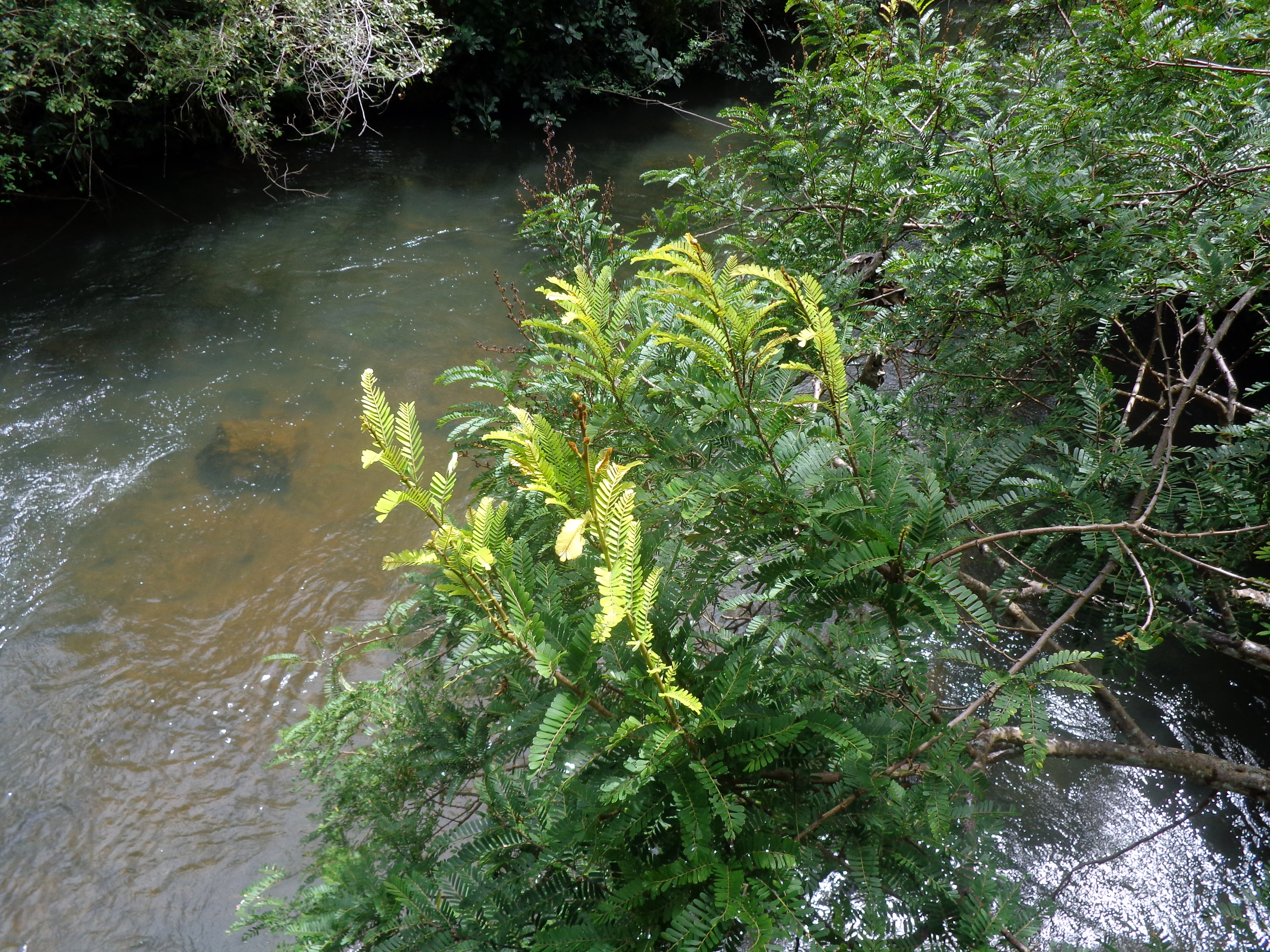 Yuquerí guazú (Machaerium aculeatum), en el Parque nacional Iguazú, Misiones, Argentina. Leguminosa fabaceae